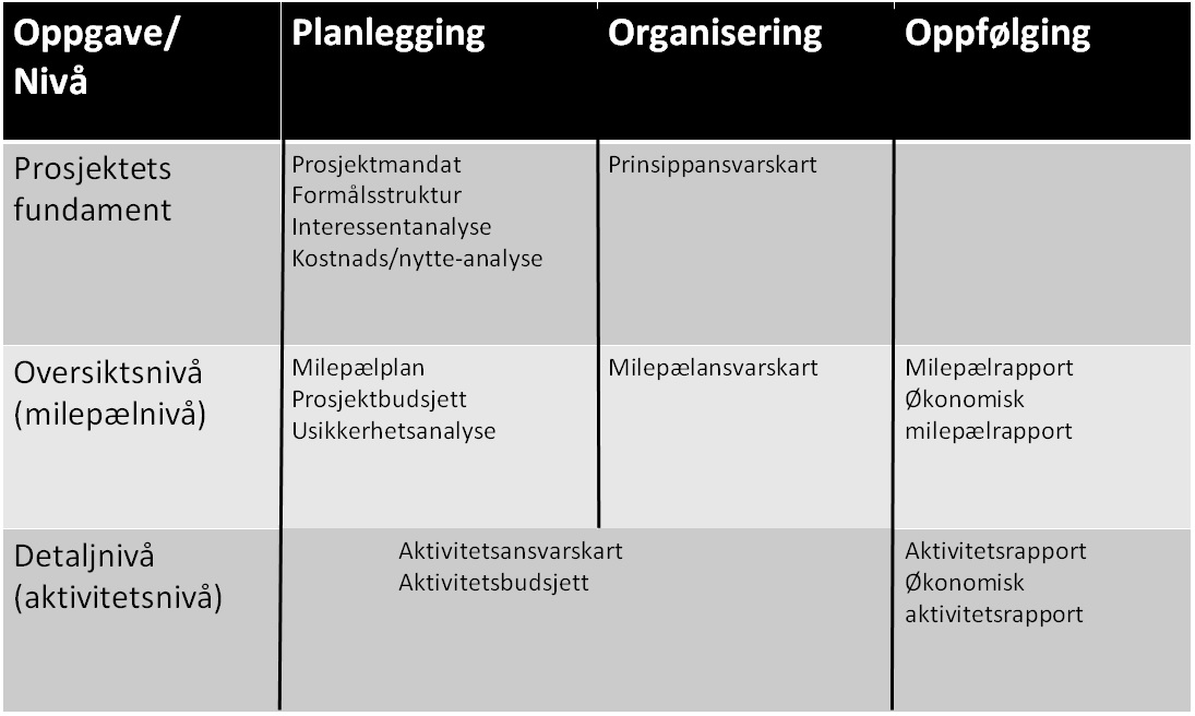 Oversikt over Målrettet Prosjektstyring